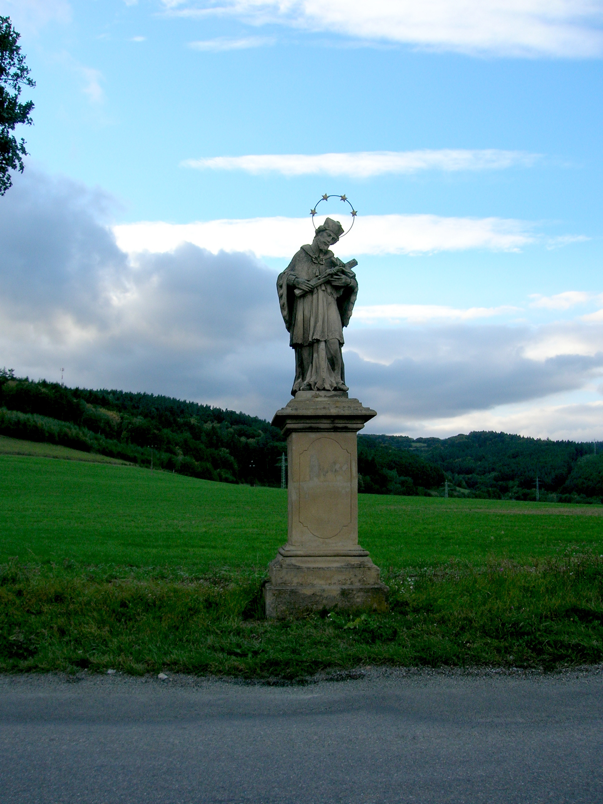 Socha sv. Jana Nepomuckého před Lomnicí